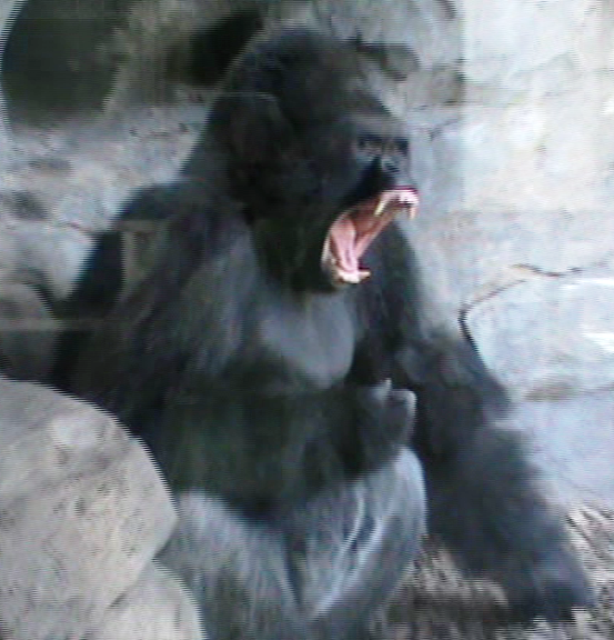 Macho de Gorilla gorilla bostezando en el Bioparc de Valencia